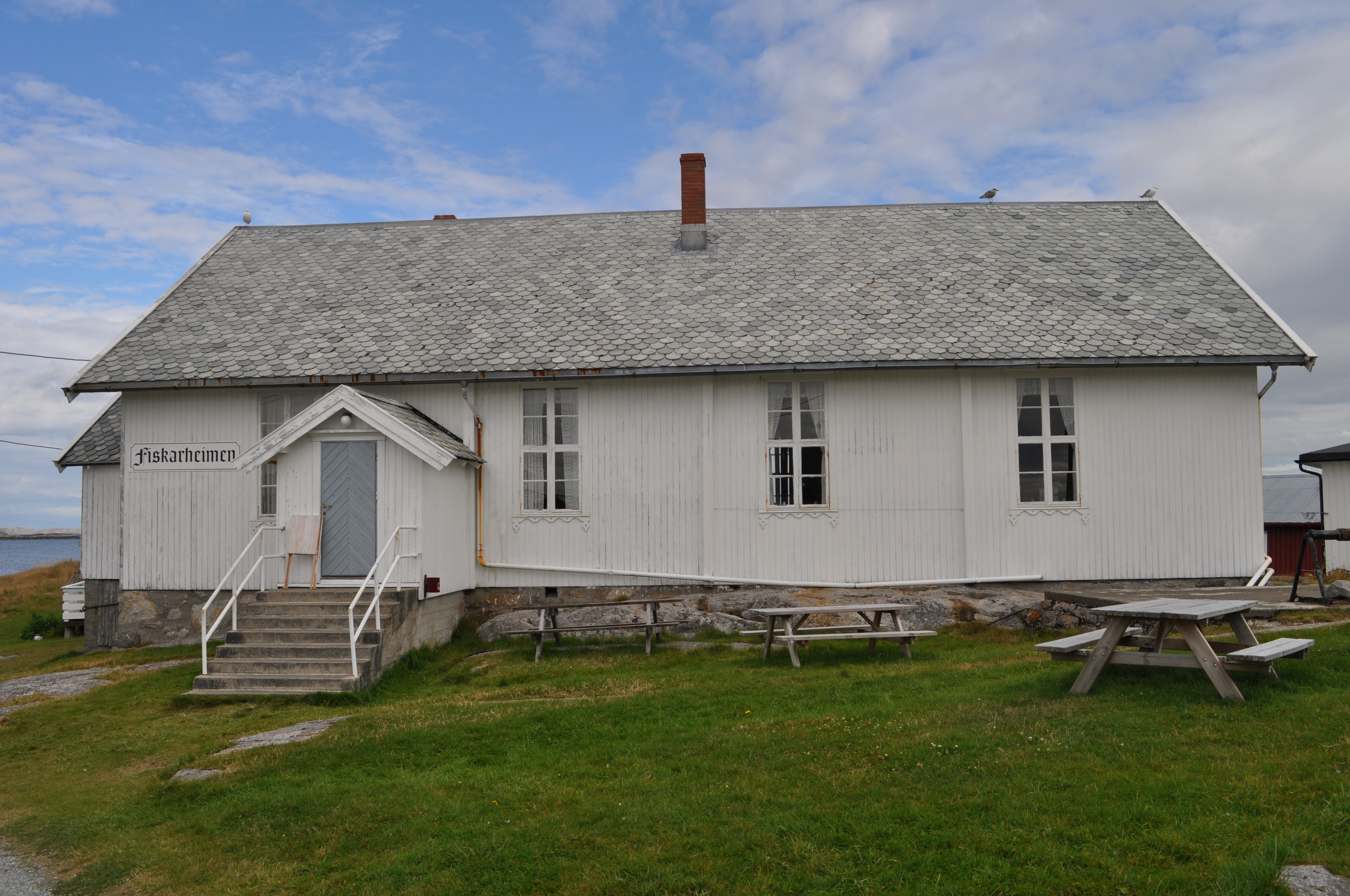 Bilde fra fiskeværet Sør-Gjæslingan i Vikna kommune. Bygningen er Fiskarheimen.